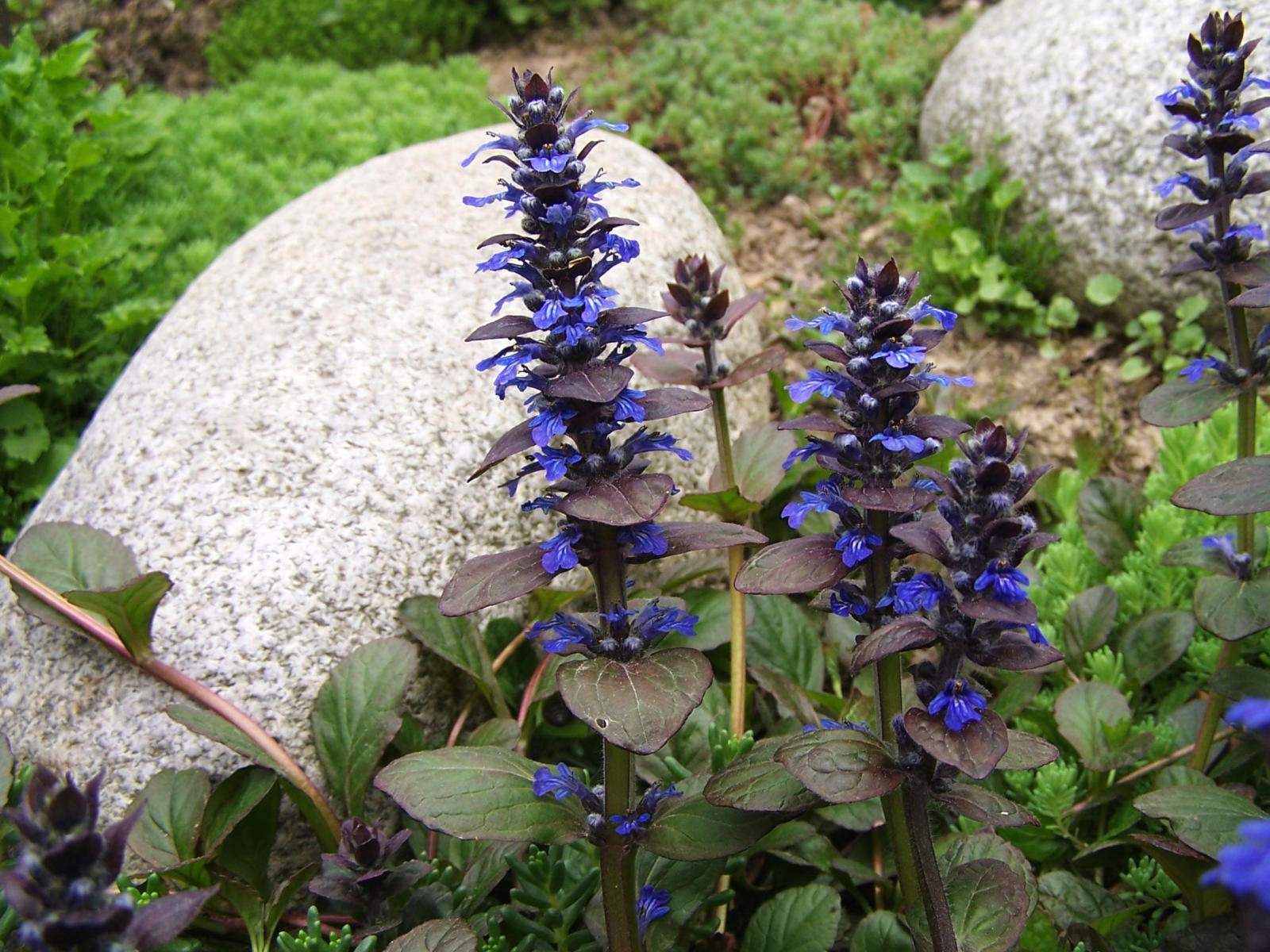 Ajuga reptans (pl. dąbrówka rozłogowa)